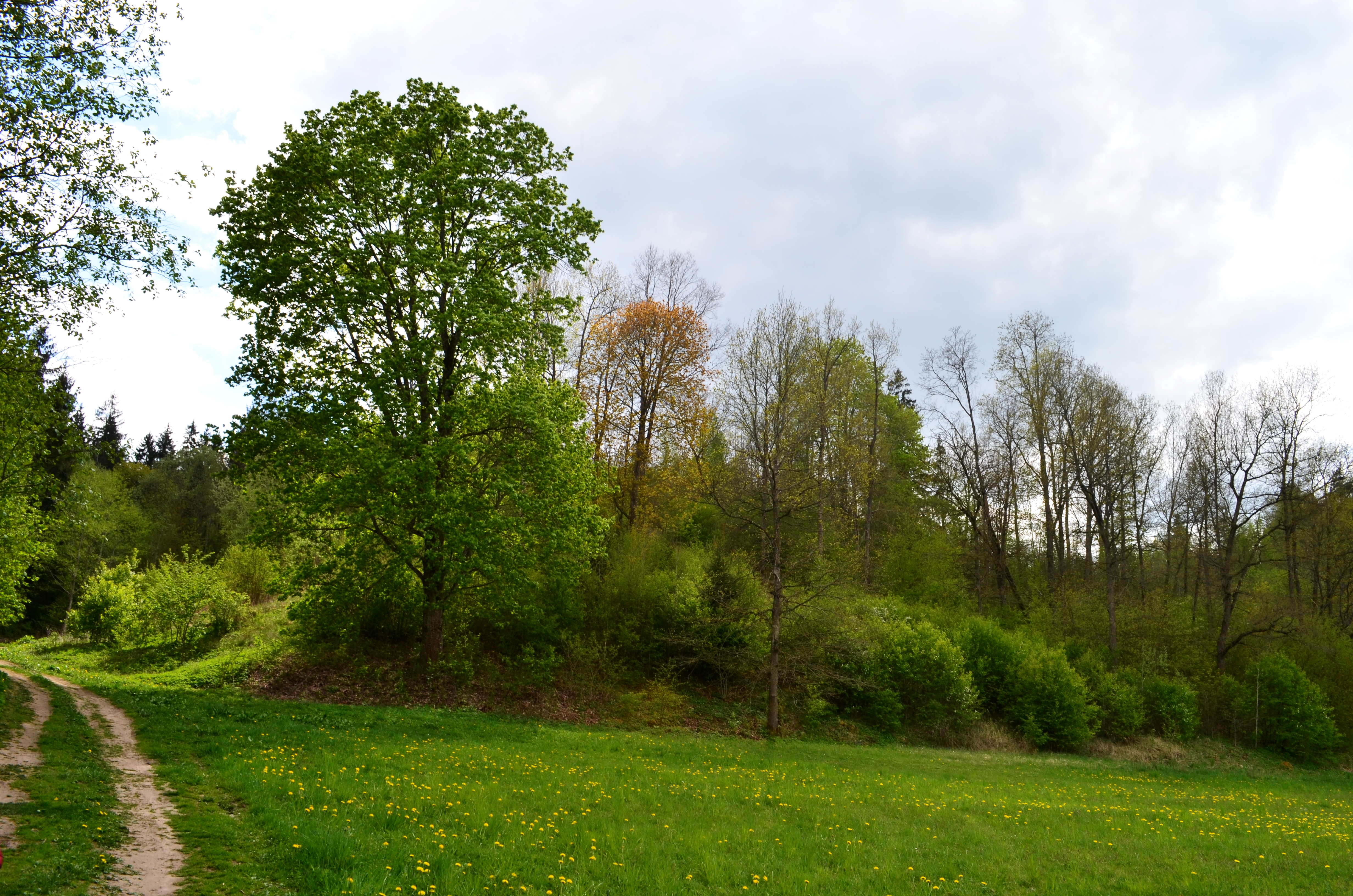 Žuklijų piliakalnis, Šakių raj.